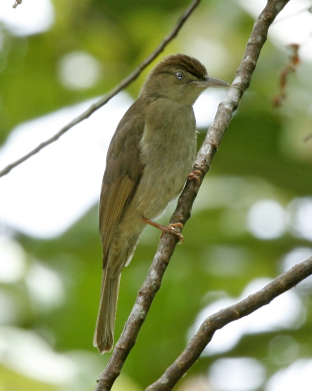 Iole olivacea